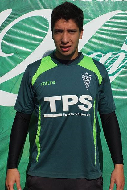 Edición de la fotografía "JuanAbarca.jpg", que muestra al jugador de fútbol Juan Abarca.